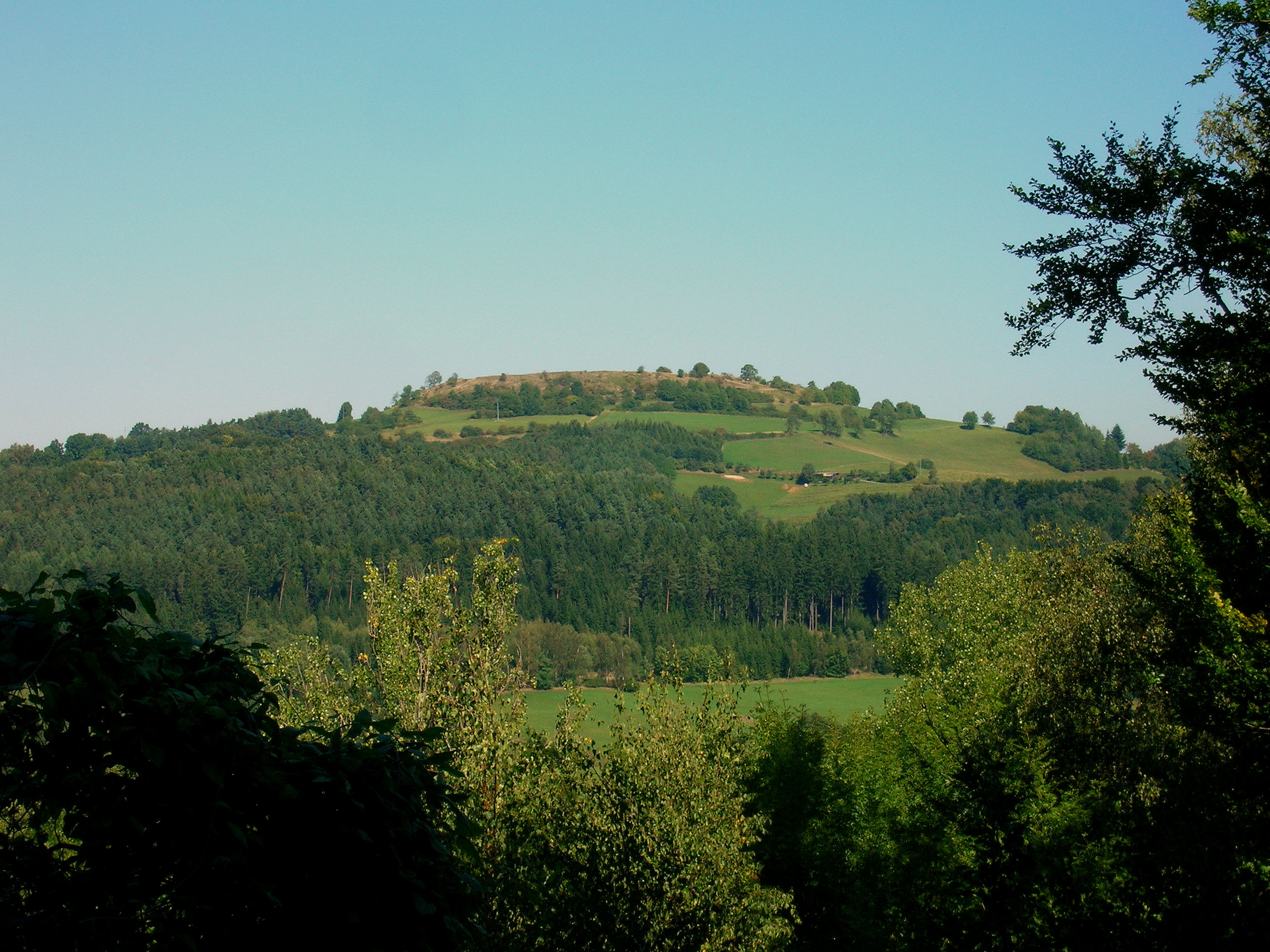 Ansicht der Neubürg aus südlicher Richtung